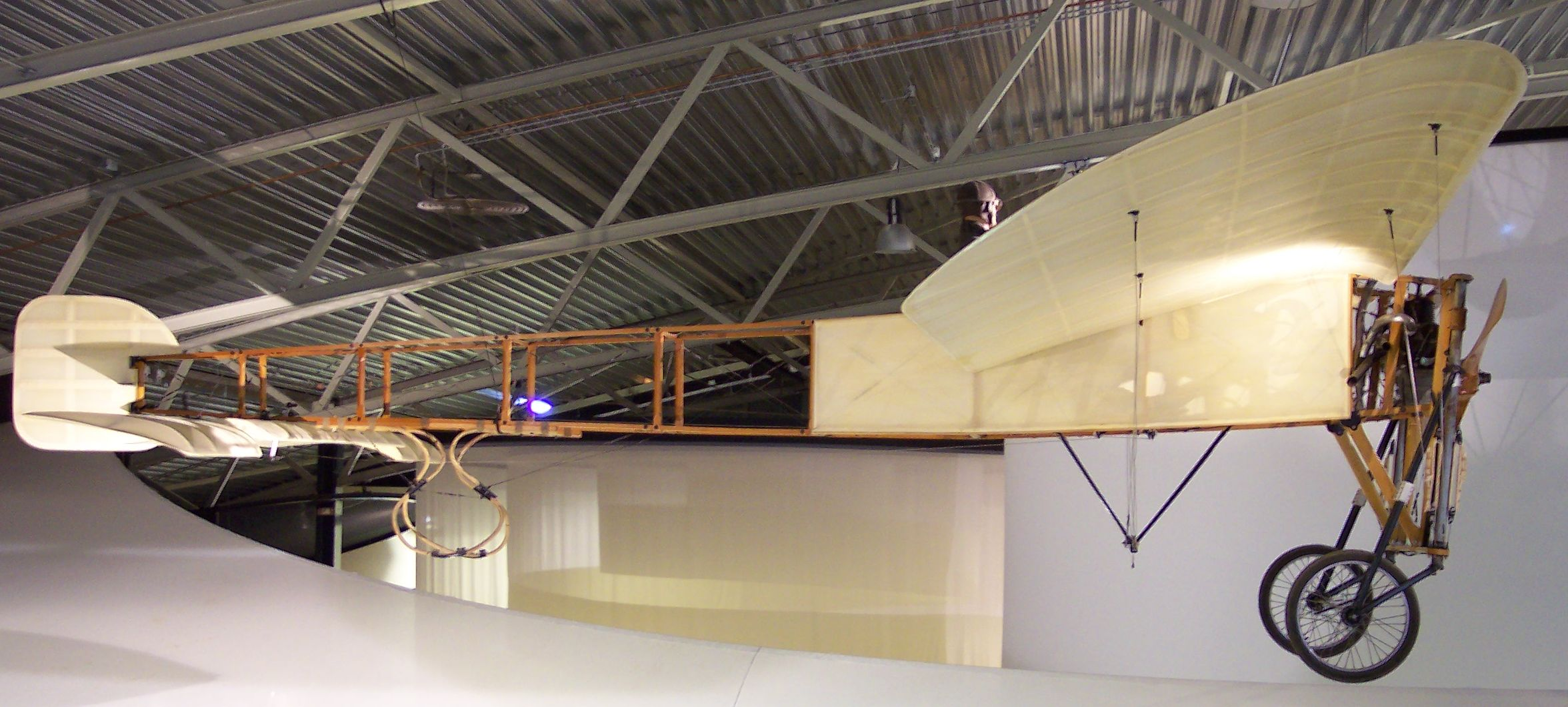 Bleriot_XI_Replika